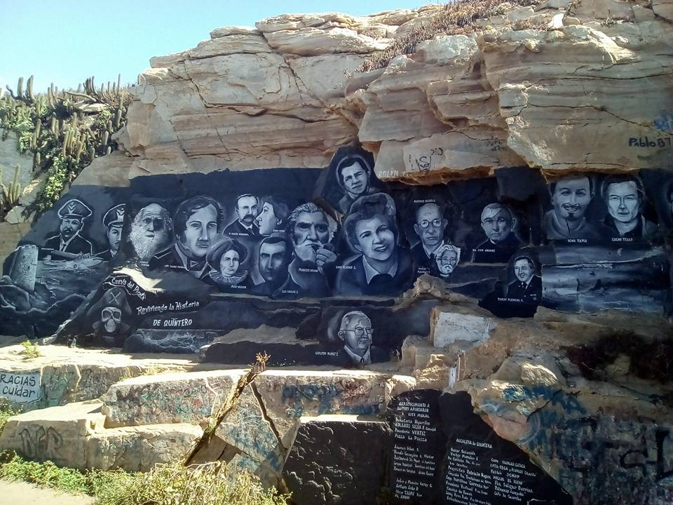 Mural en Cueva del Pirata en Quintero recordando los personajes que han visitado el sitio